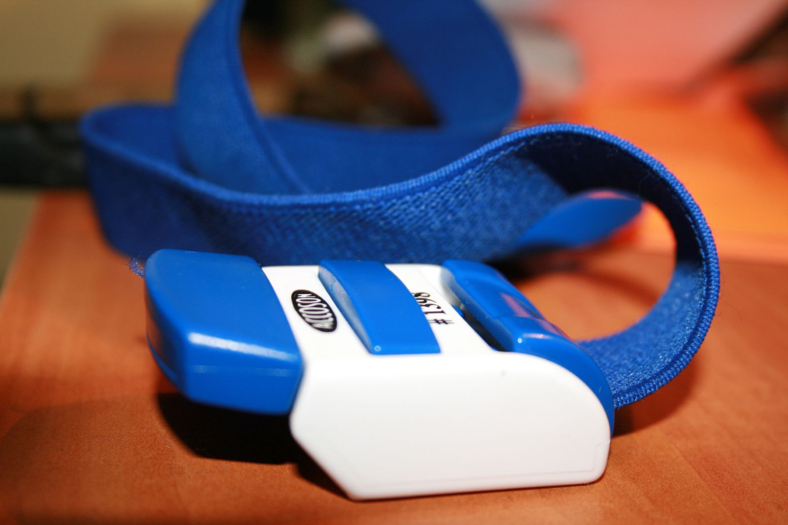 Kelly's Tourniquet